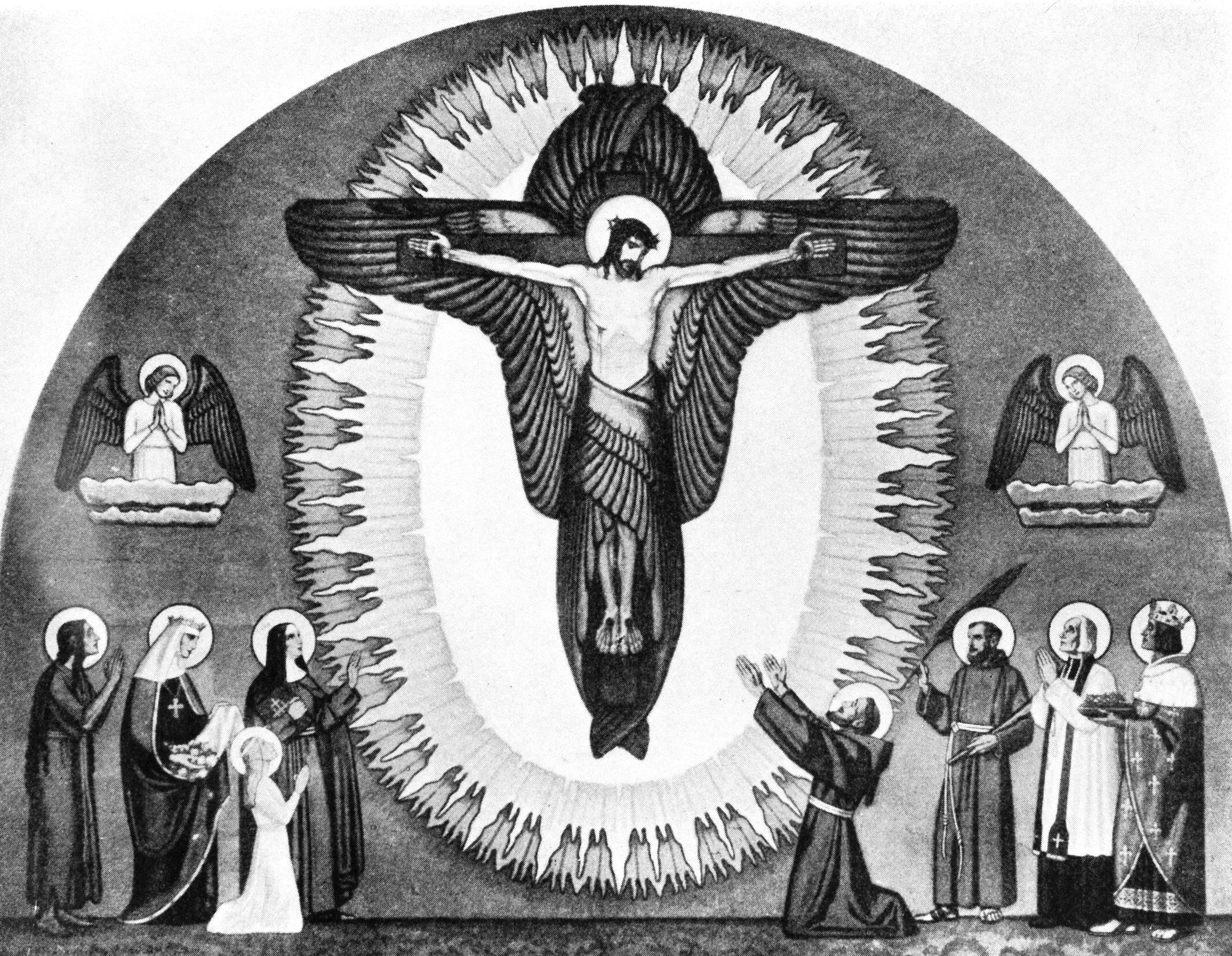 Römisch-katholische Pfarrkirche St. Franziskus Zürich-Wollishofen Fresko Chor. Stigmatisation des heiligen Franziskus. Acht Bilder aus dem Leben des heiligen Franziskus. Gemalt von Kirchenmaler Fritz Kunz (1868–1947) von 1932 bis 1934.